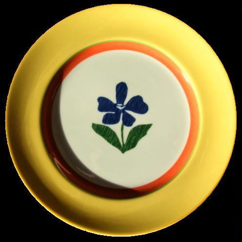 Prato de porcelana da empresa portuguesa Vista Alegre (Portugal), fabricada no Brasil.